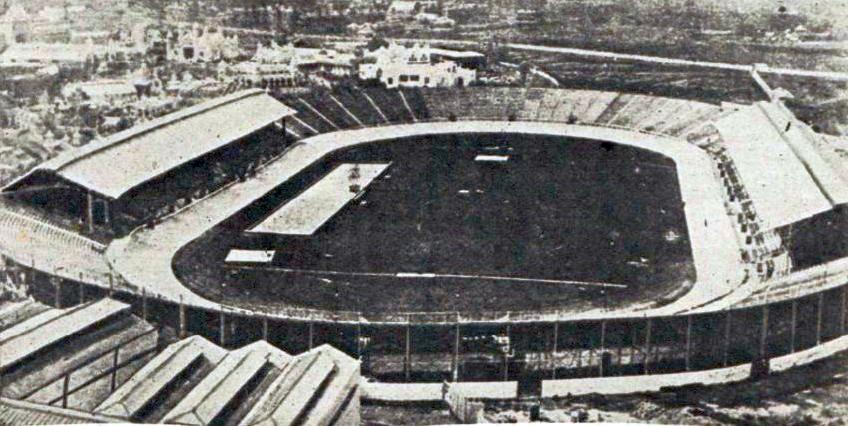 Le White City Stadium de Londres, pour les JO de 1908.